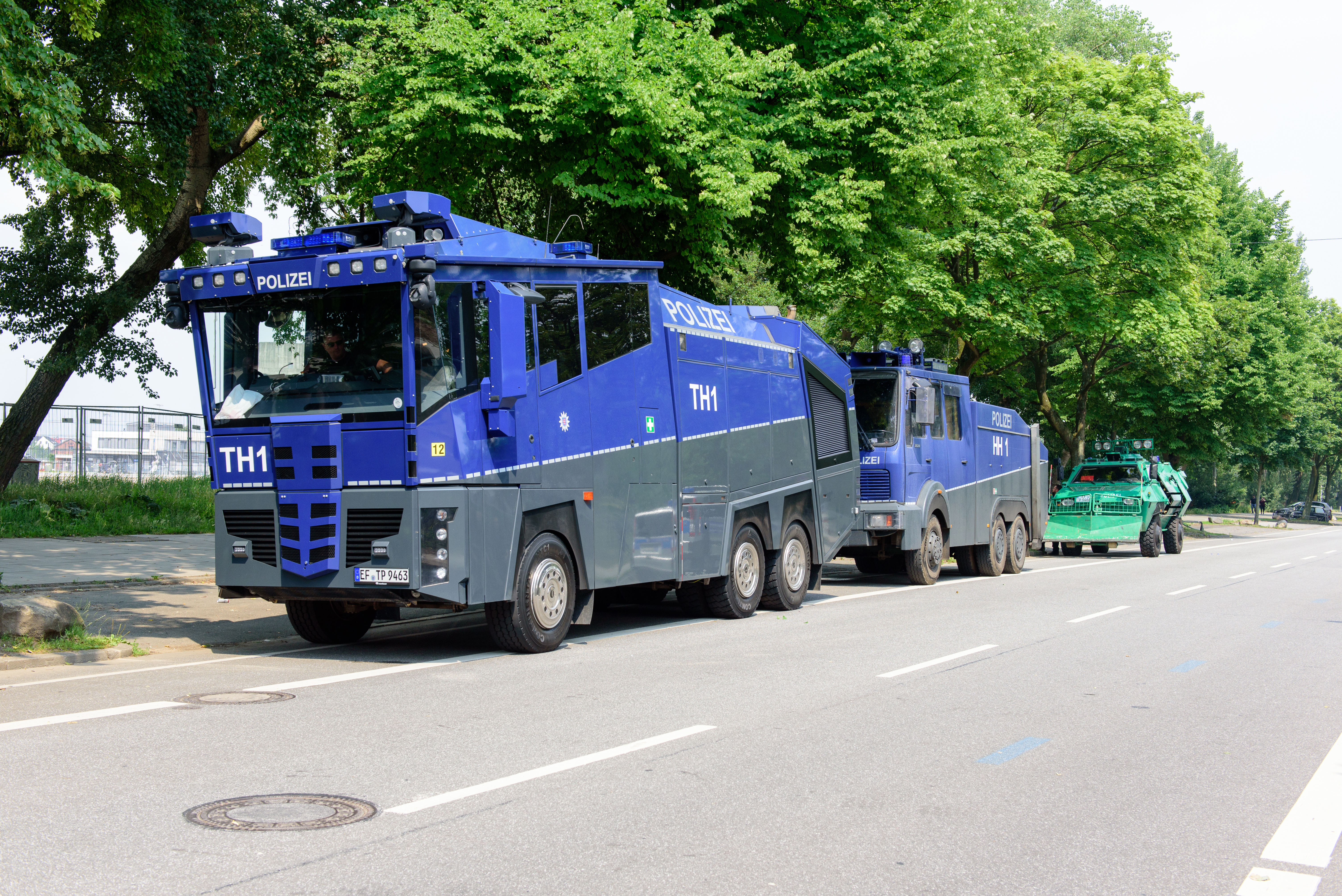 G-20 Inpressionen aus der Hamburger Innstadt